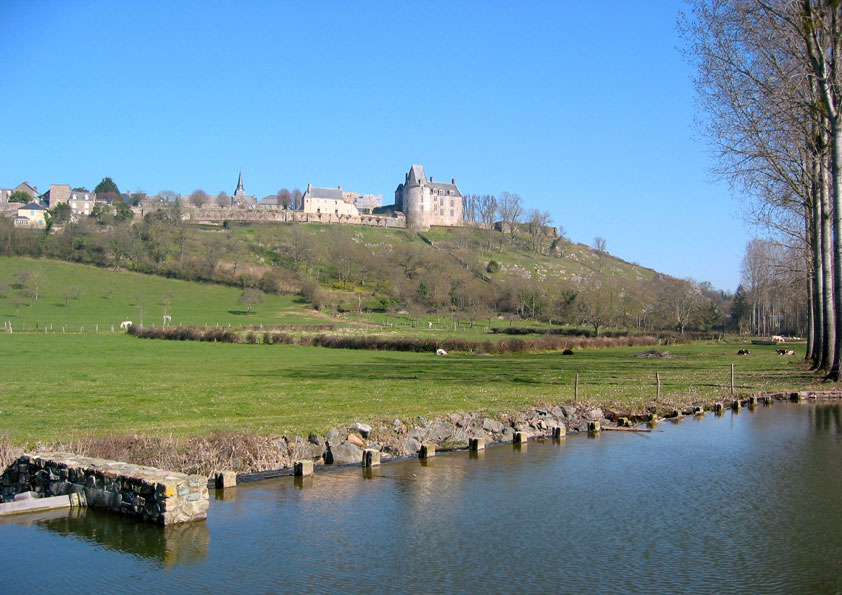 L'Erve aux choiseau